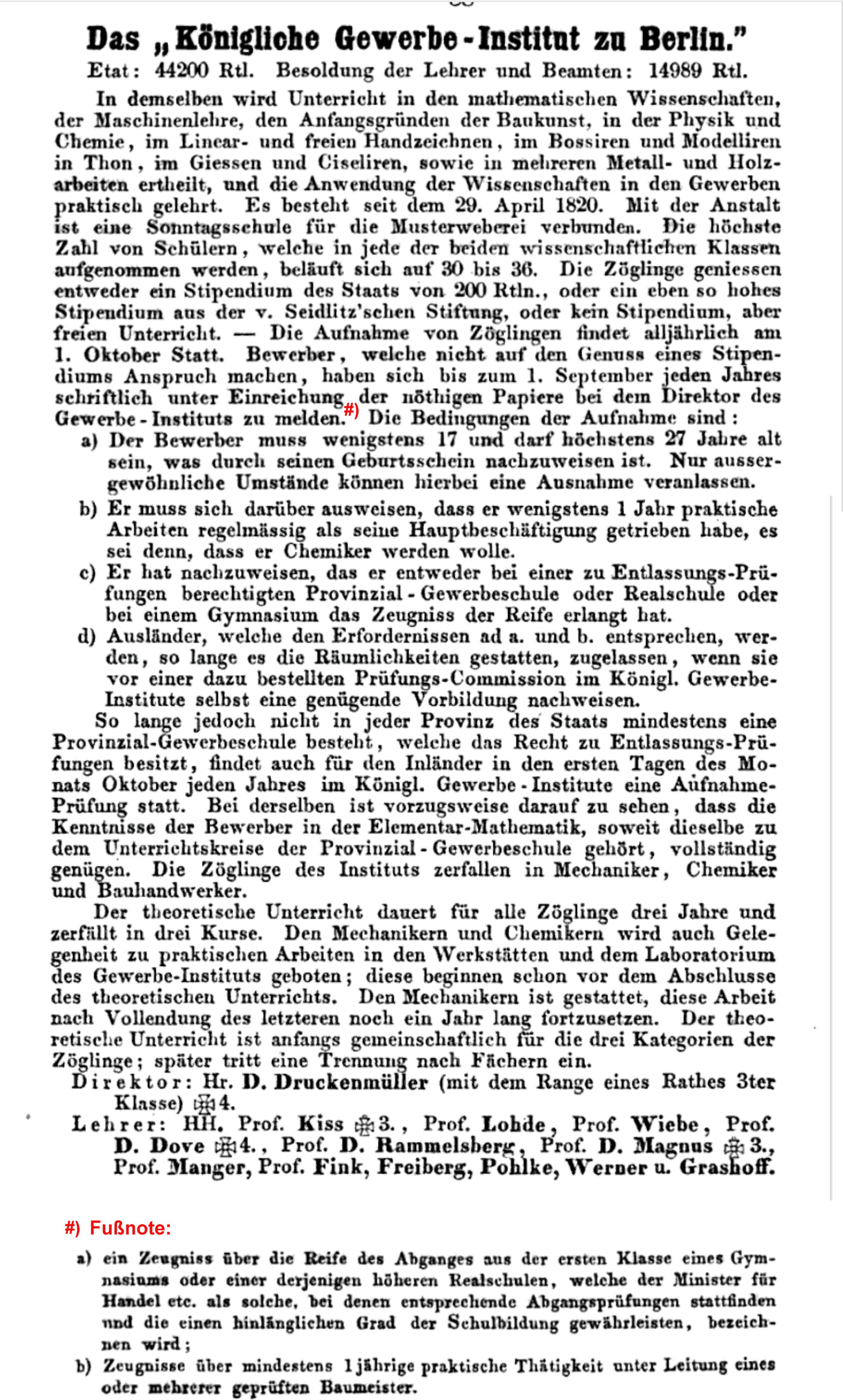 Aufnahmebedingungen Gewerbeinstitut Berlin 1855 aus „Preussischer Schul-Kalender für 1855, 4. Jg. (Auszug S. 65+66)“